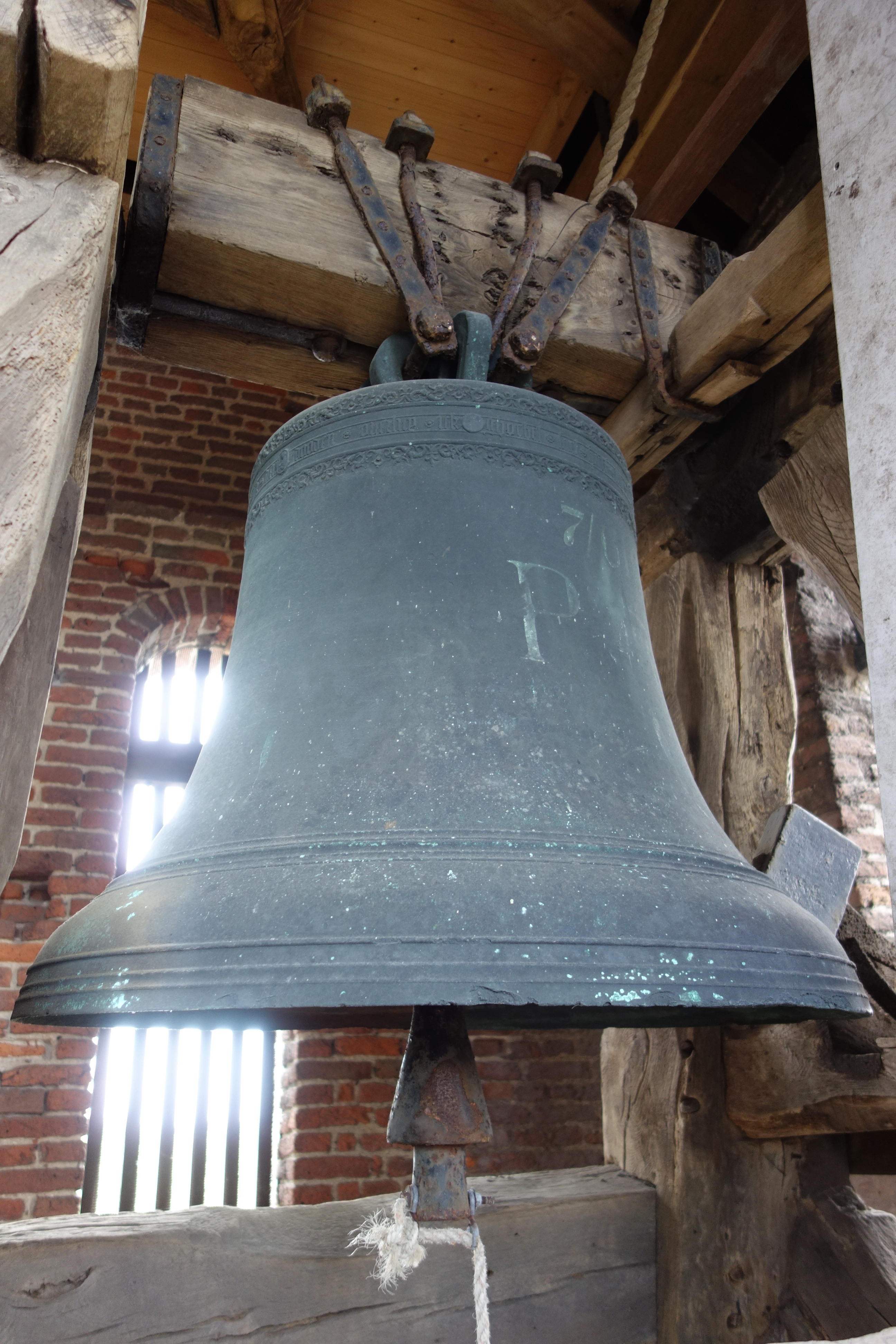 Luidklok in de kerktoren van de hervormde kerk van Westerblokker.